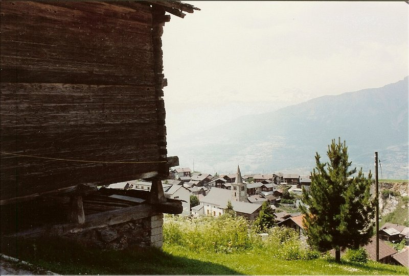 Village de Nax, photo de Jean-Claude Grand.